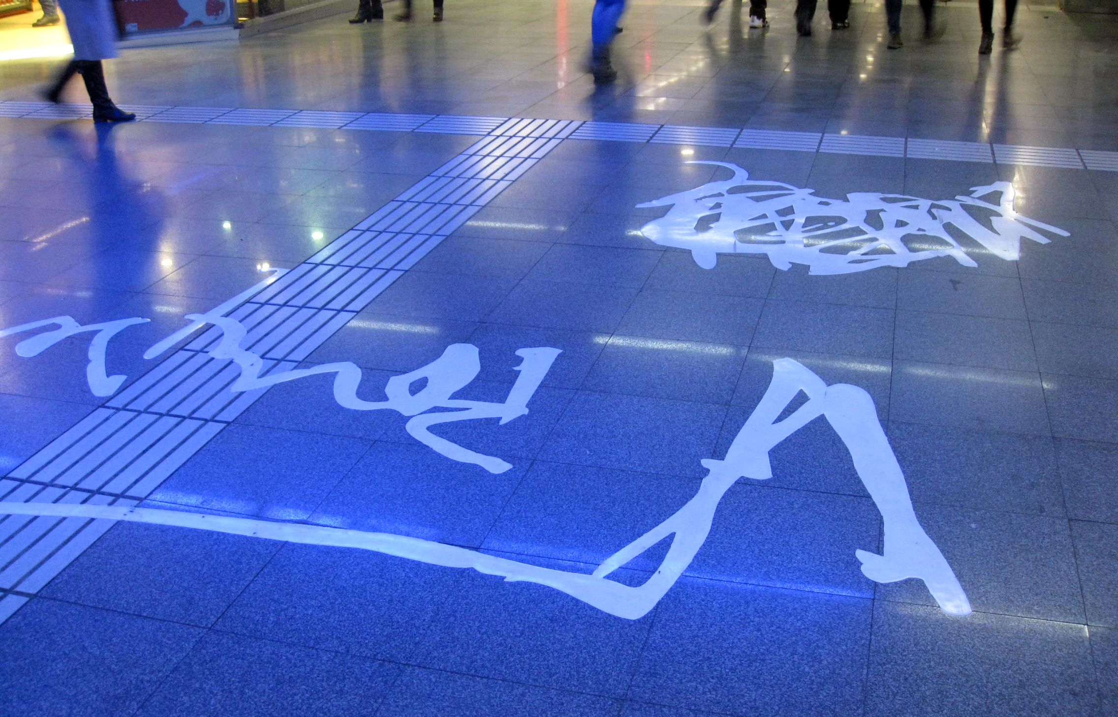 Meeting Point (Jordi Benito). FFGC Estació Provença, accés c. Balmes (Barcelona)